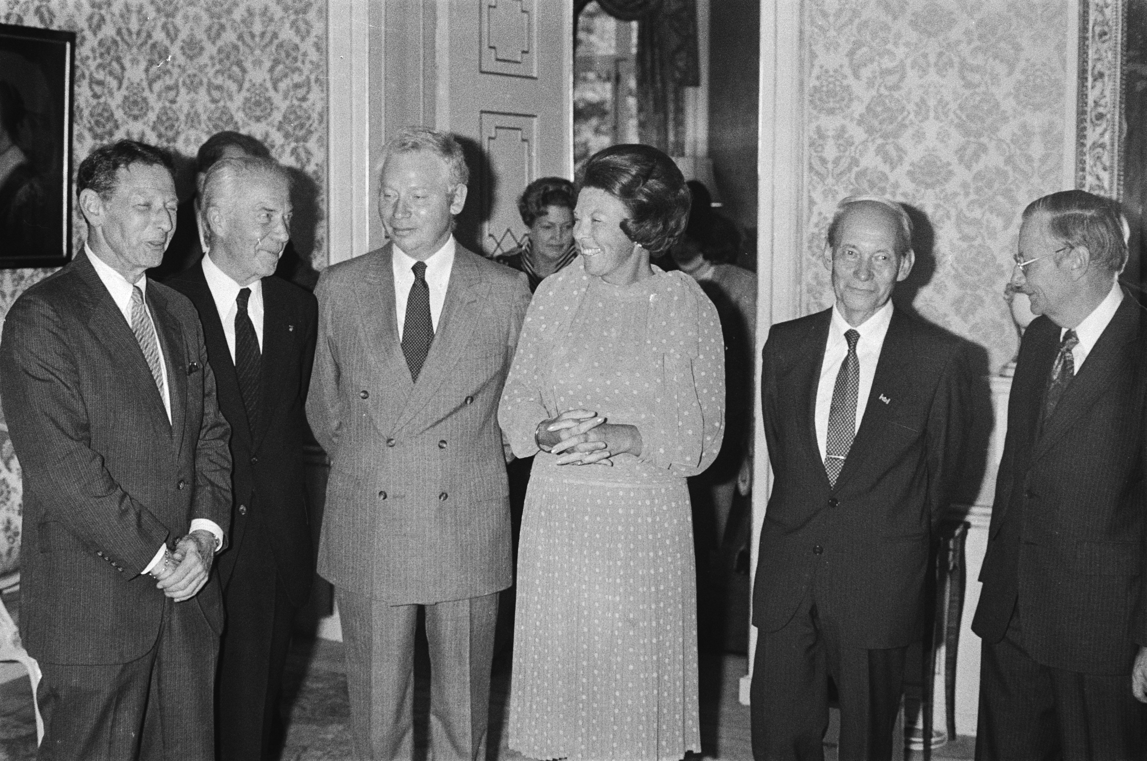 Collectie / Archief : Fotocollectie Anefo Reportage / Serie : Koningin Beatrix ontvangt Nobelprijswinnaars Beschrijving : koninginnen, onderscheidingen, Beatrix (koningin Nederland) Datum : 31 augustus 1983 Trefwoorden : koninginnen, onderscheidingen Persoonsnaam : Beatrix (koningin Nederland) Fotograaf : Croes, Rob C. / Anefo Auteursrechthebbende : Nationaal Archief Materiaalsoort : Negatief (zwart/wit) Nummer archiefinventaris : bekijk toegang 2.24.01.05 Bestanddeelnummer : 932-6825